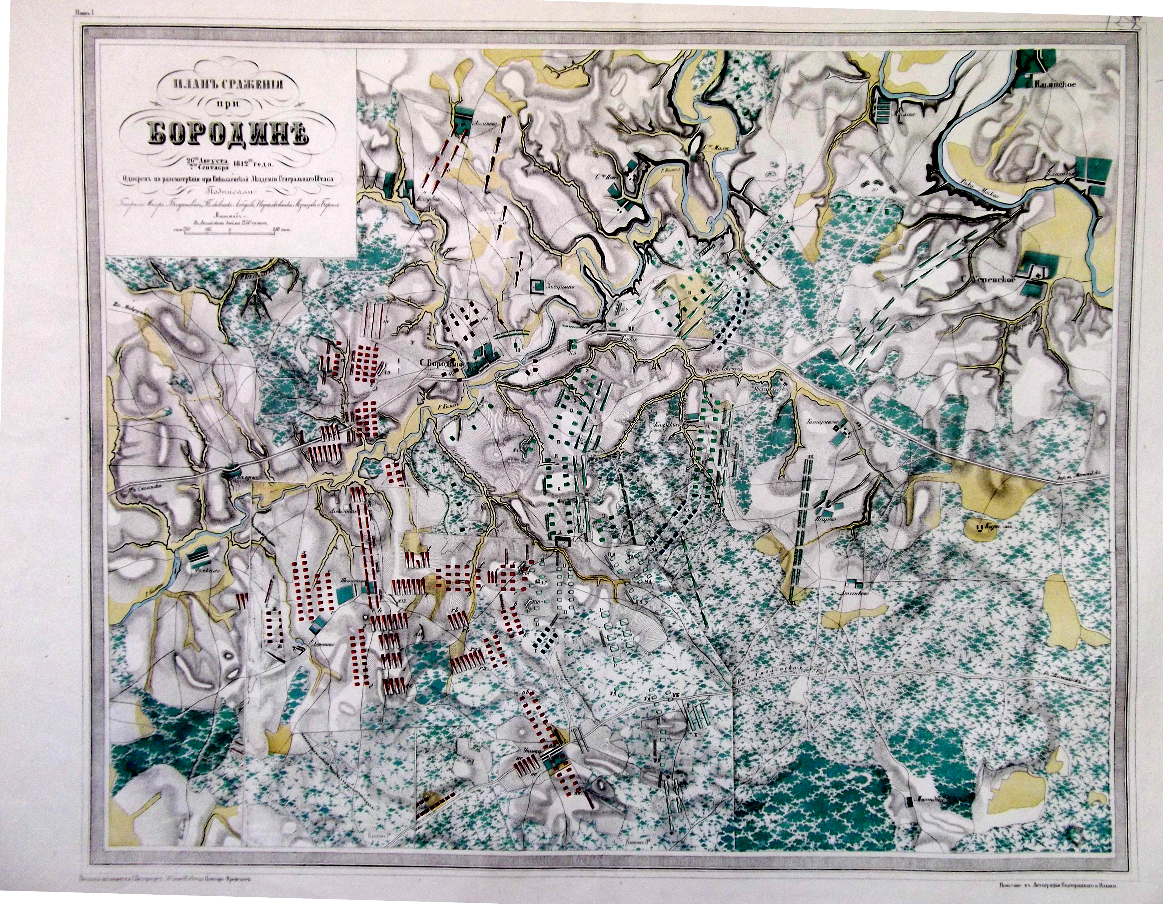 План сражения при Бородино 26 августа (7 сентября) 1812 года